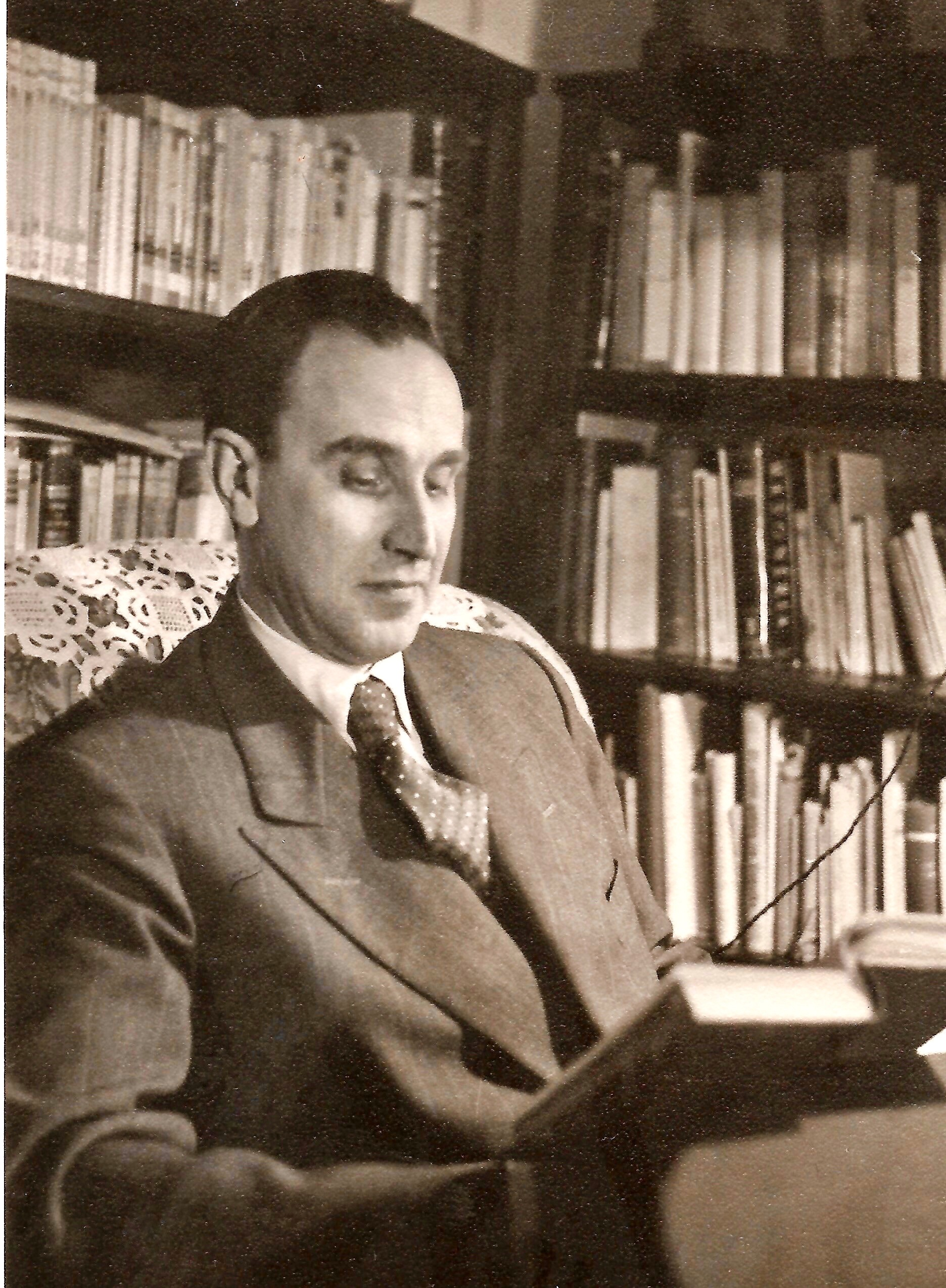 José María Bugella, periodista español, nacido en Málaga en 1910 y fallecido en Madrid en 1960.